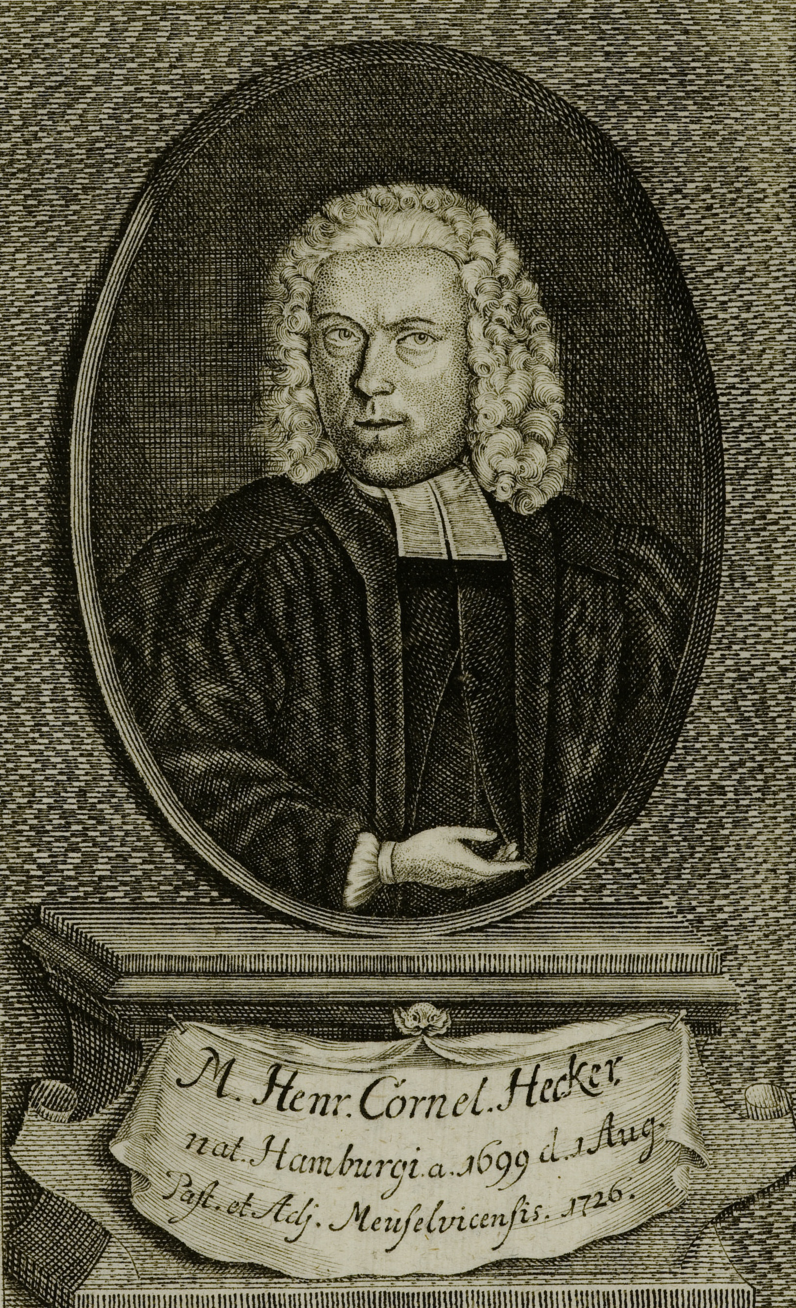 Bildnis von Heinrich Cornelius Hecker